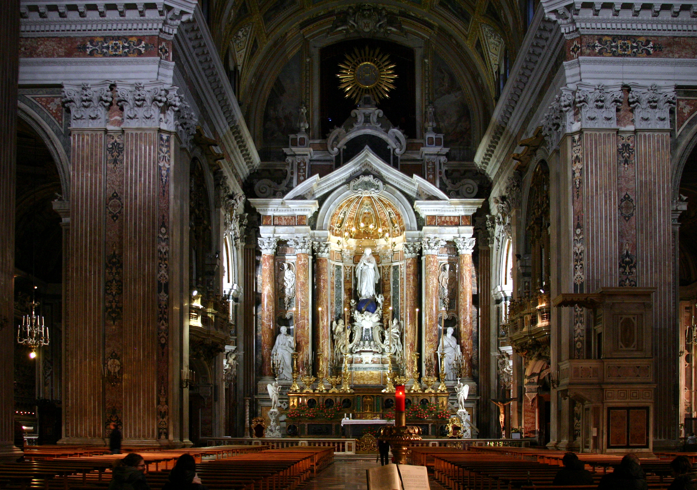 Gesù Nuovo - Naples